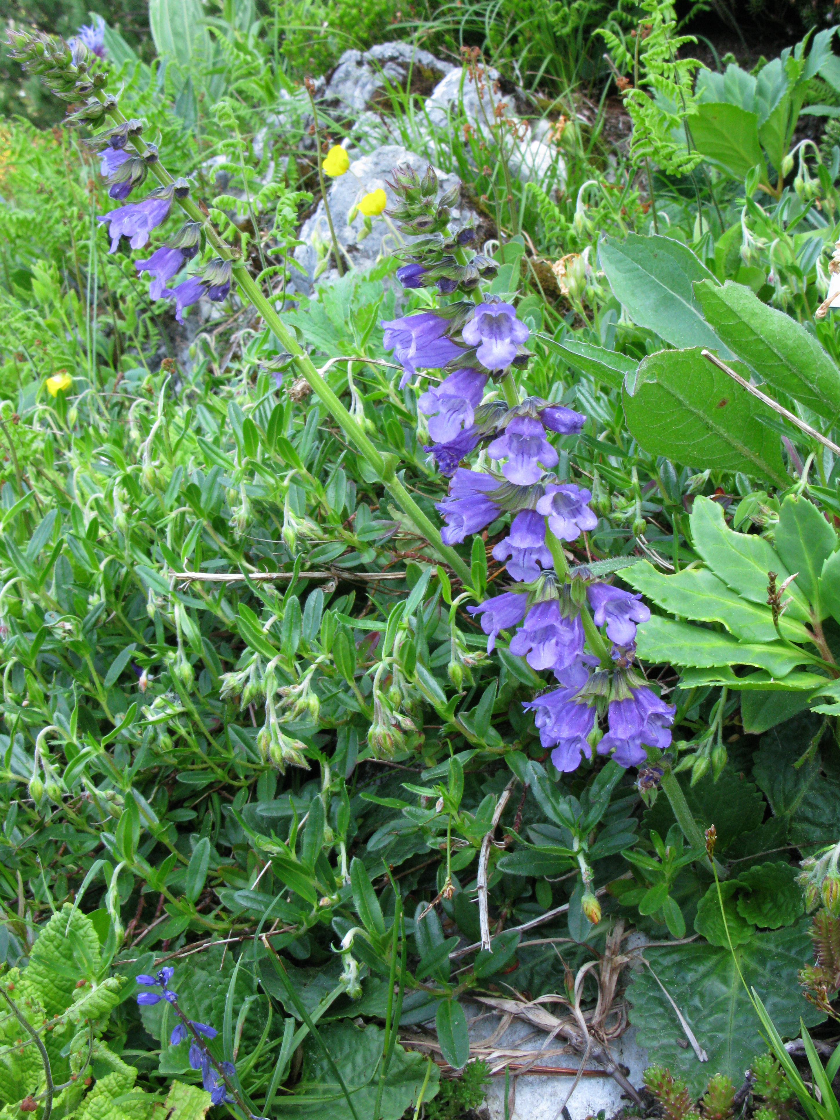 Beschreibung kommt später